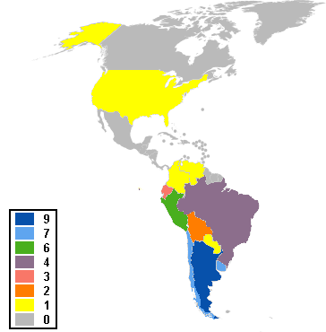 Mapa de las Américas, que muestra a los países que han organizado la Copa América, desde su primera edición en 1916 hasta la fecha.